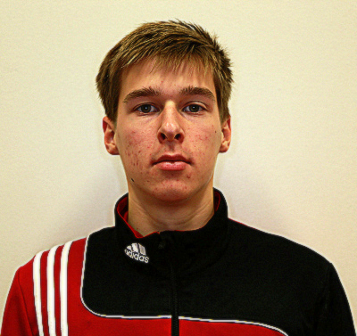 Koskenkorvan Urheilijoiden kauden 2014 pelaajakuva. Pelaaja: Ville Haapamäki